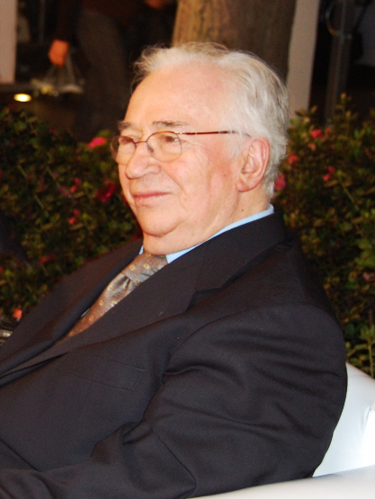 (Ex presidente Belisario Betancur en inauguración de En Busca del Traje Perdido II) Foto: Vanessa Reyes